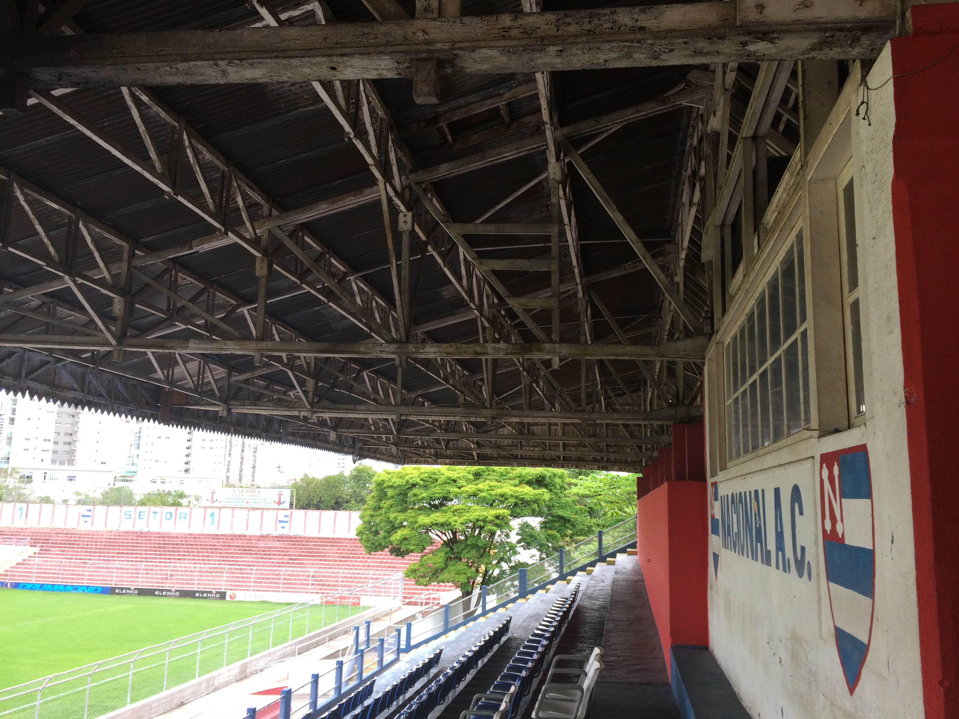 Cobertura da tribuna principal do Estádio Nicolau Alayon.